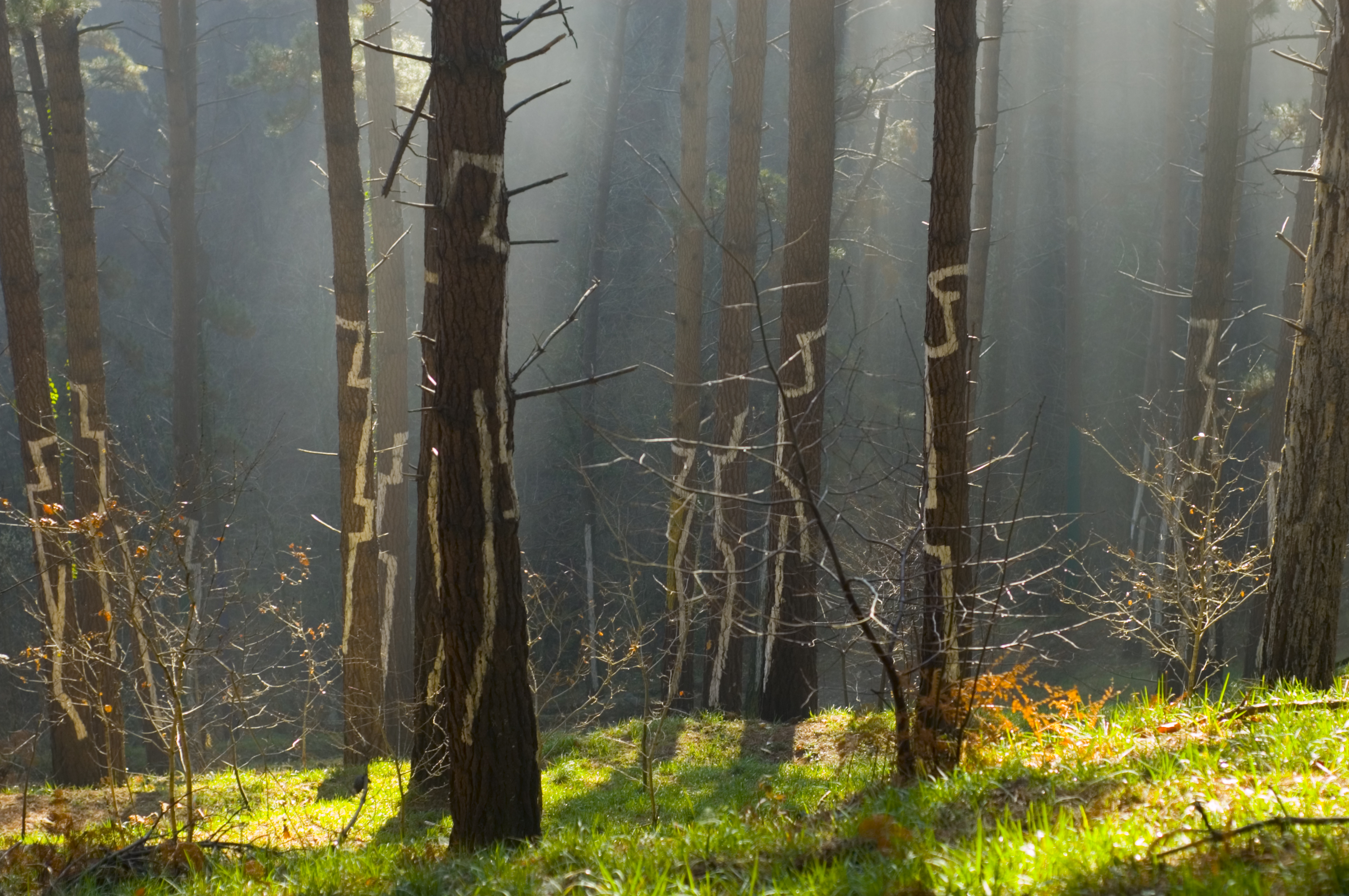 Oma forest - Kortezubi - Ibarrola